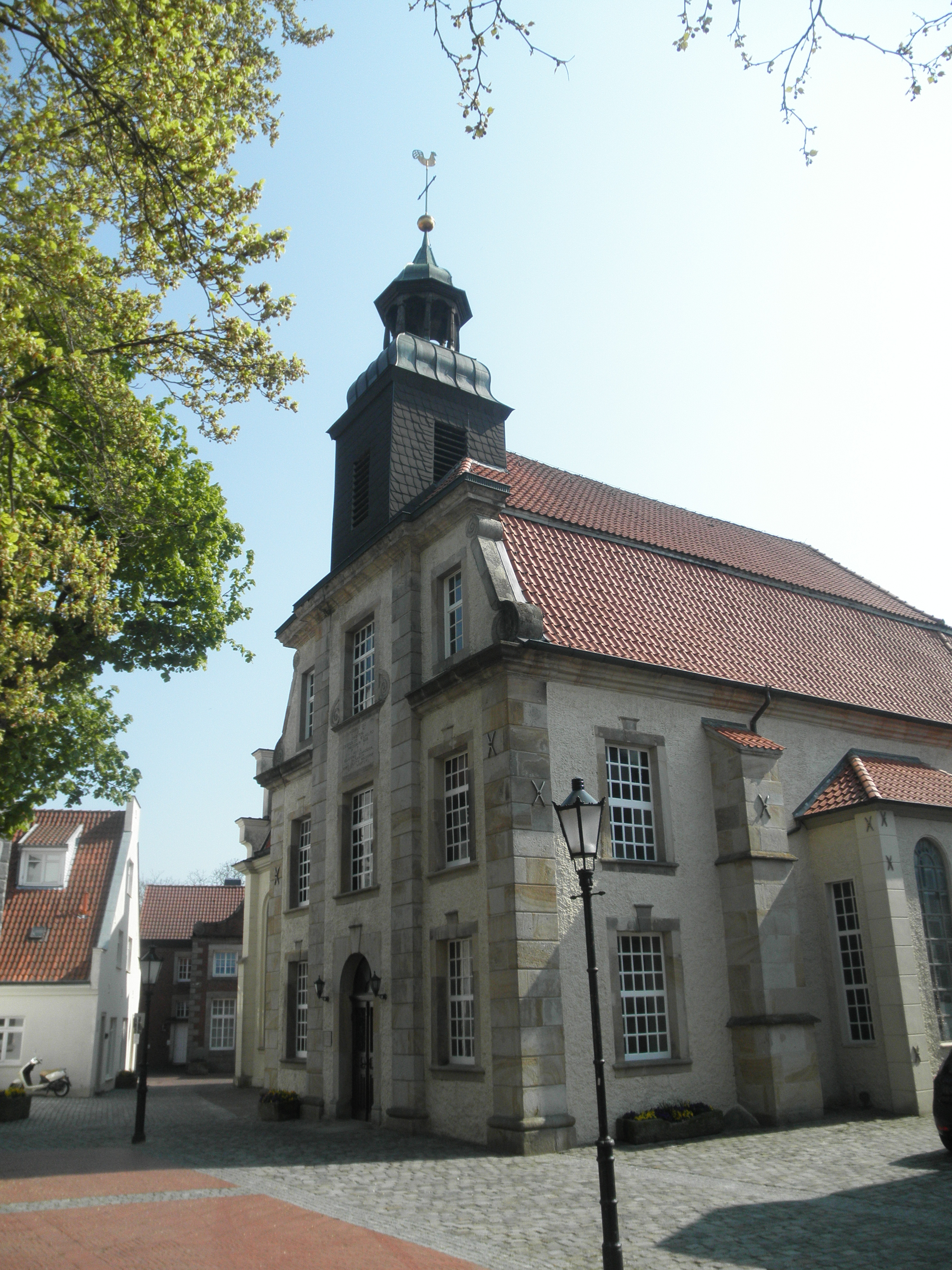 preĝejo Kreuzkirche Universitätsplatz en Lingen, Germanio